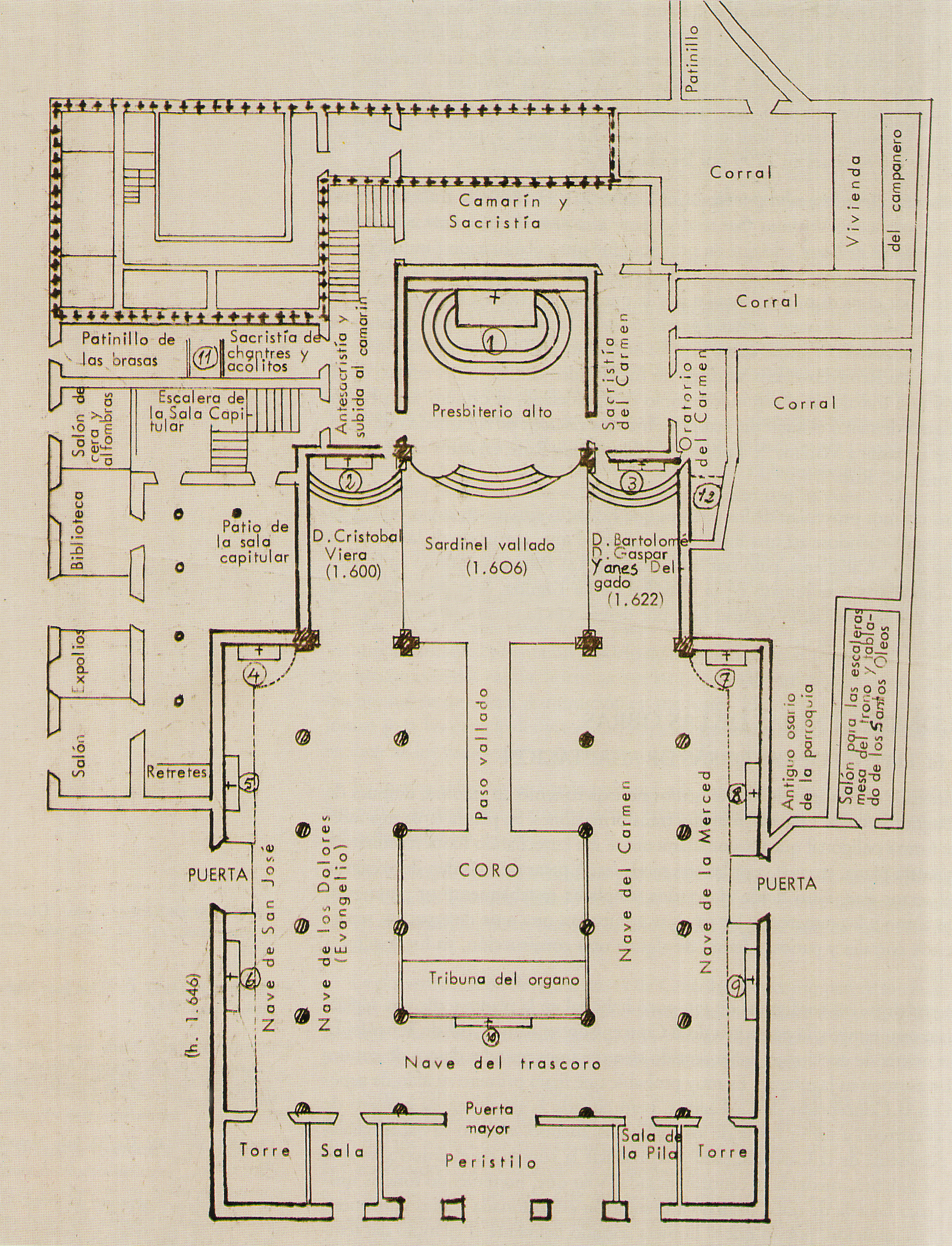 Planta de la Catedral de La Laguna y las Casas Capitulares después de 1.809